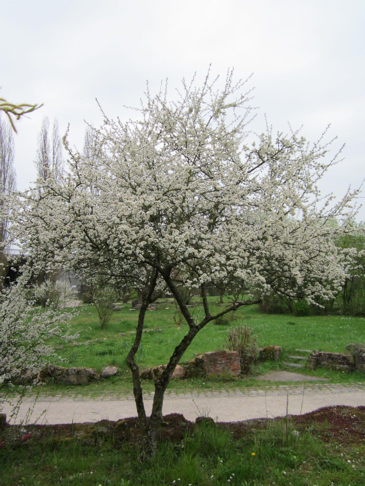 Kirschpflaume (Prunus cerasifera) im Bürgerpark Saarbrücken